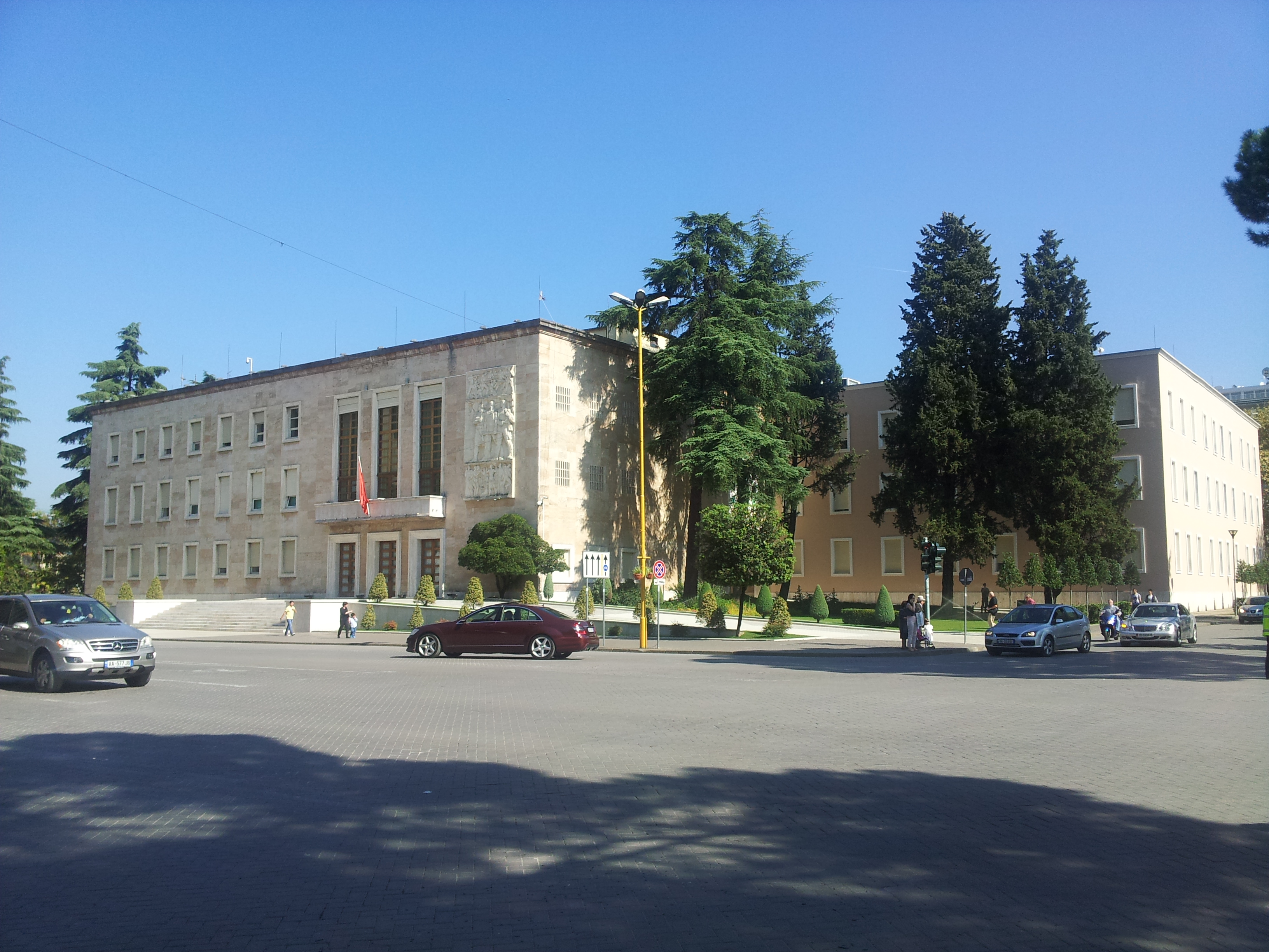 Kryeministria, Tirane. Pamje ballore nga ana e bulevardit.